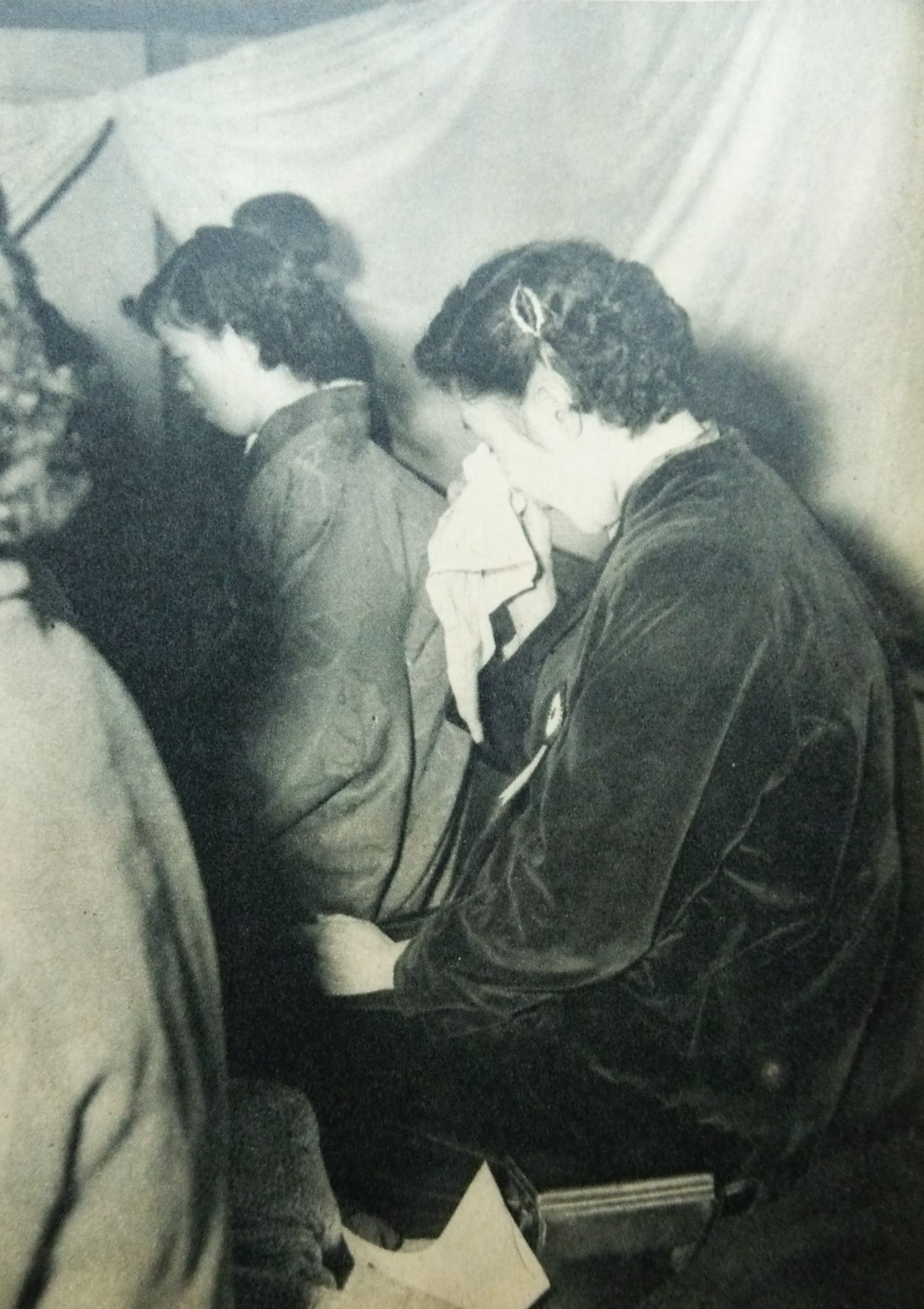 森永ヒ素ミルク中毒事件被害児の母たち